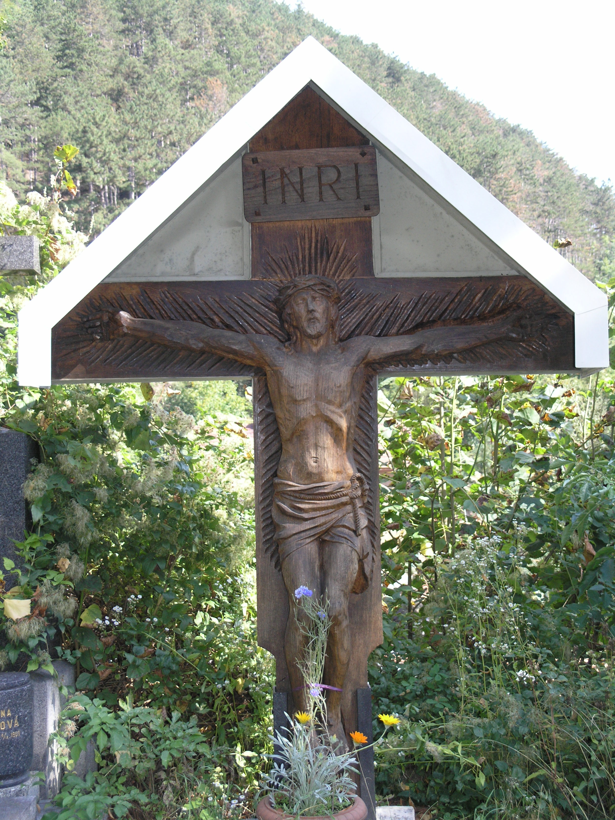 Kostel svatého Palmácia - detail náhrobku